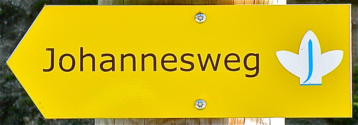 Markierungstafel für den Johannesweg im unteren Mühlviertel im Bezirk Freistadt mit dem Umriss einer Lilie als Logo